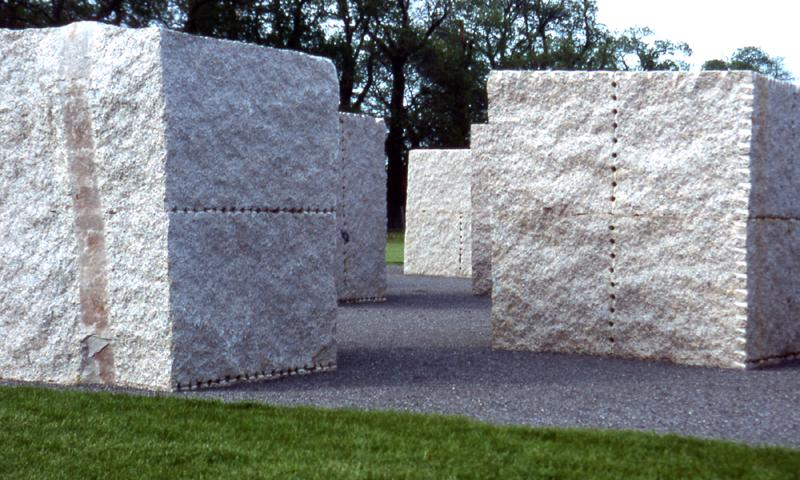 Beschreibung: Variationen eines Blocks, Ausschnitt Datum: fotografiert 2003 Fotograf: Hans Peter Schaefer Lizenz